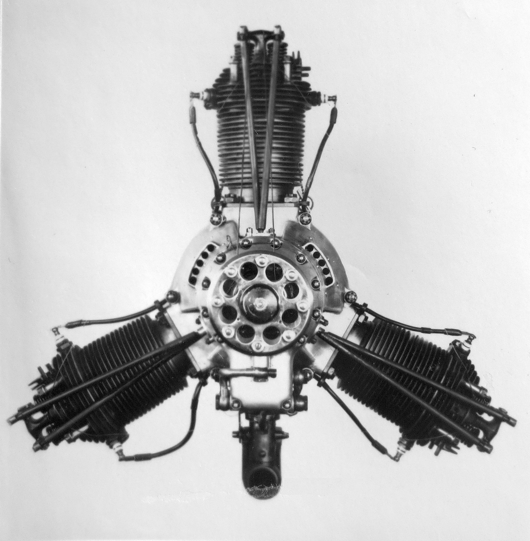 Walter NZ-45 (1931)